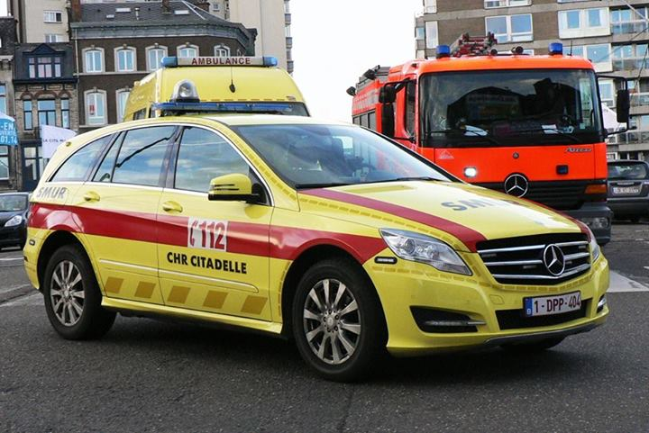 SMUR de l'Hôpital de la Citadelle (Liège, Belgique), en intervention lors d'un incendie en 2013.